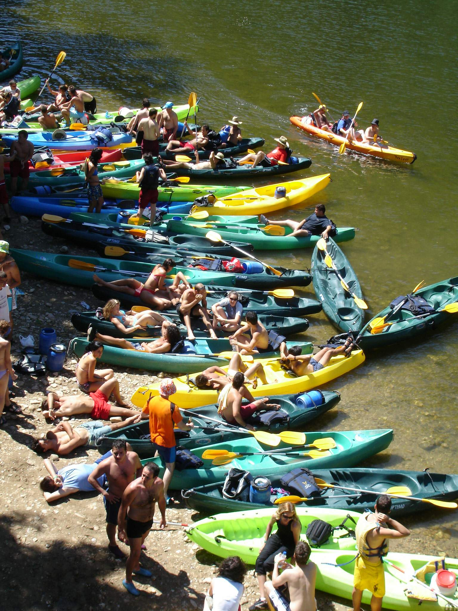 Descenso internacional del Sella 2006